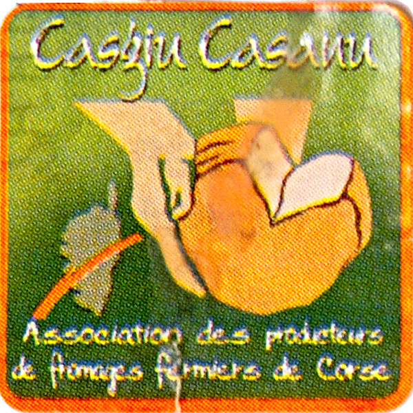 Casgiu Casanu - Macaron «Fromage fermier de Corse»